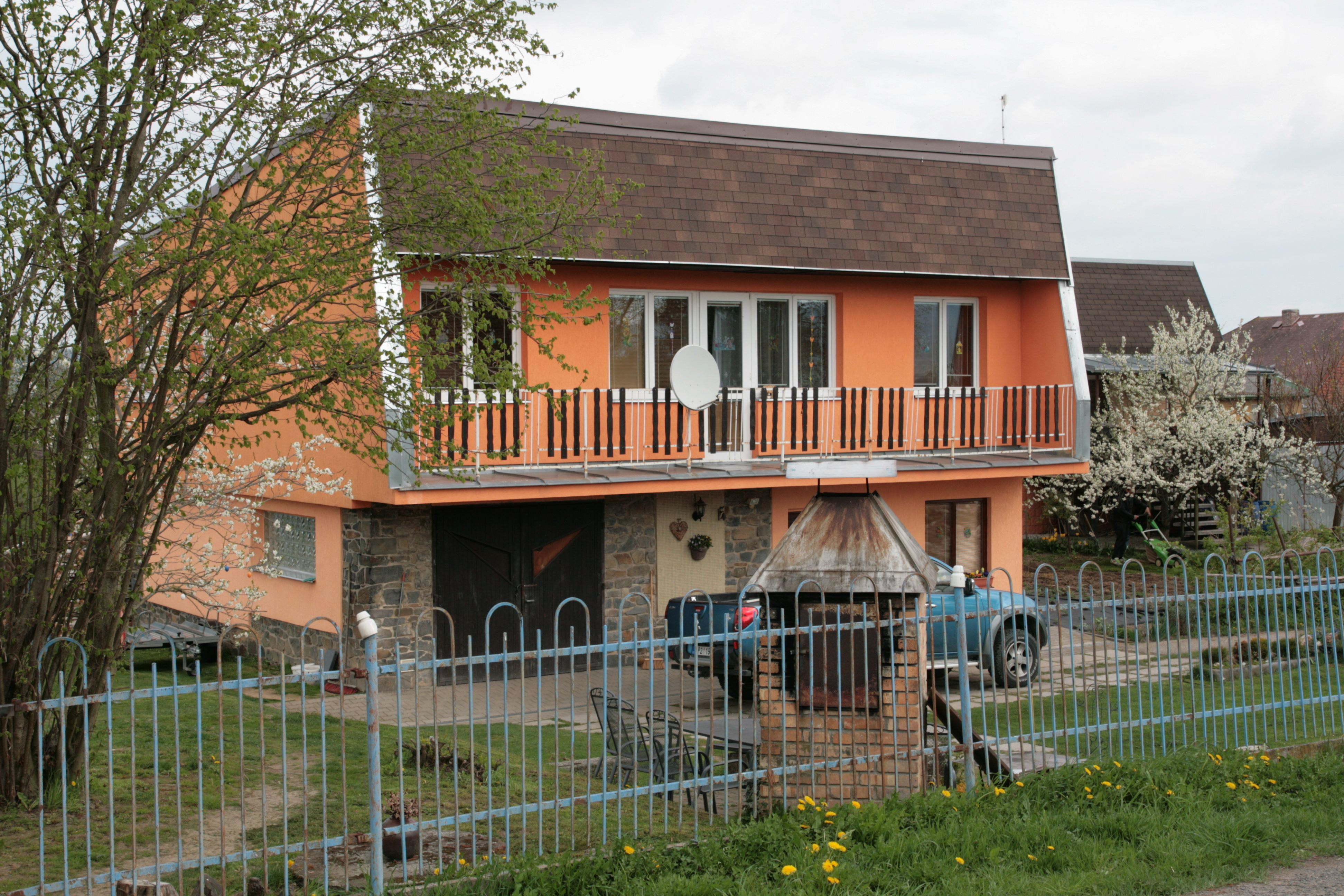 Vesnice Pihovice, část města Klatovy. Dům čp. 649.